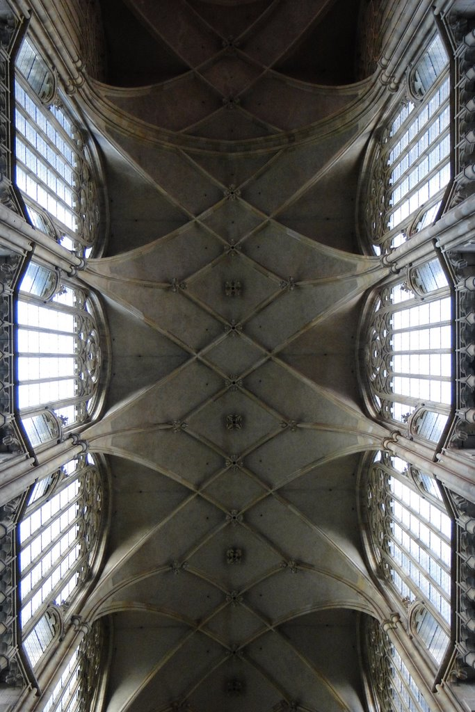 Собор св.Вита (деталь потолка)